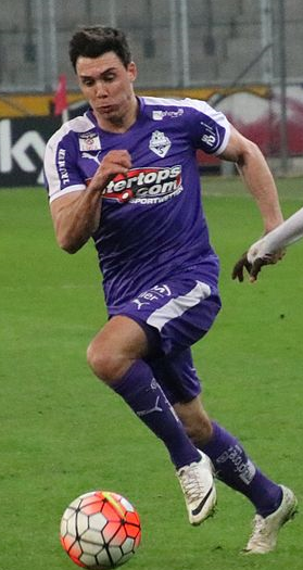 Elias Kircher